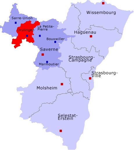 Lage des Kantons Drulingen im Arrondissement Saverne und im Département Bas-Rhin